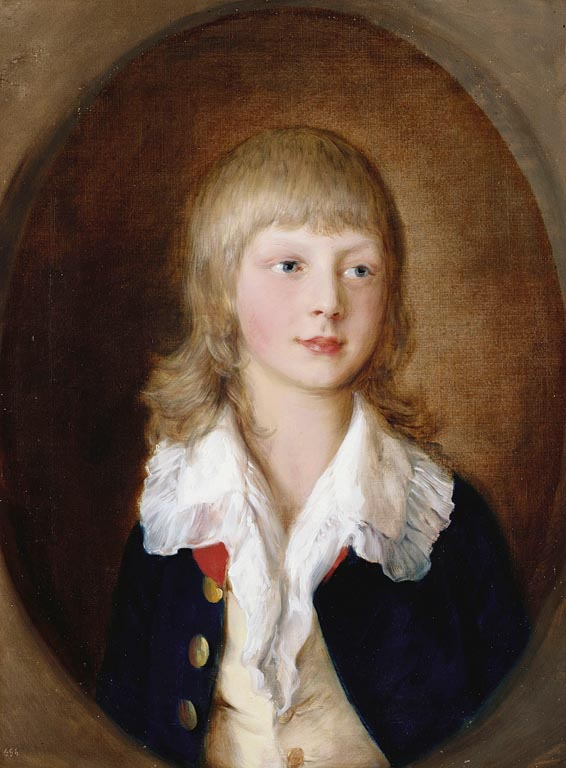 Portrait du prince Adolphe, futur duc de Cambridge, à 8 ans